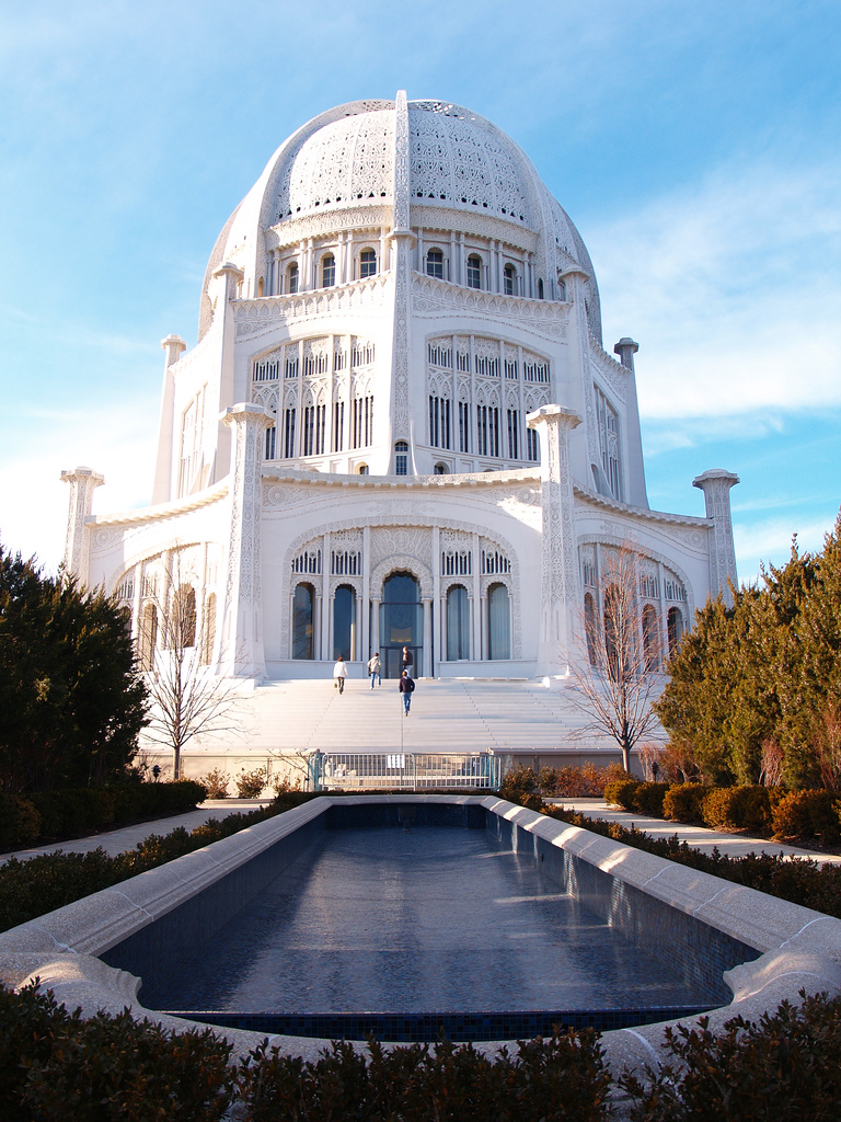 A chicagoi bahá’í templom.